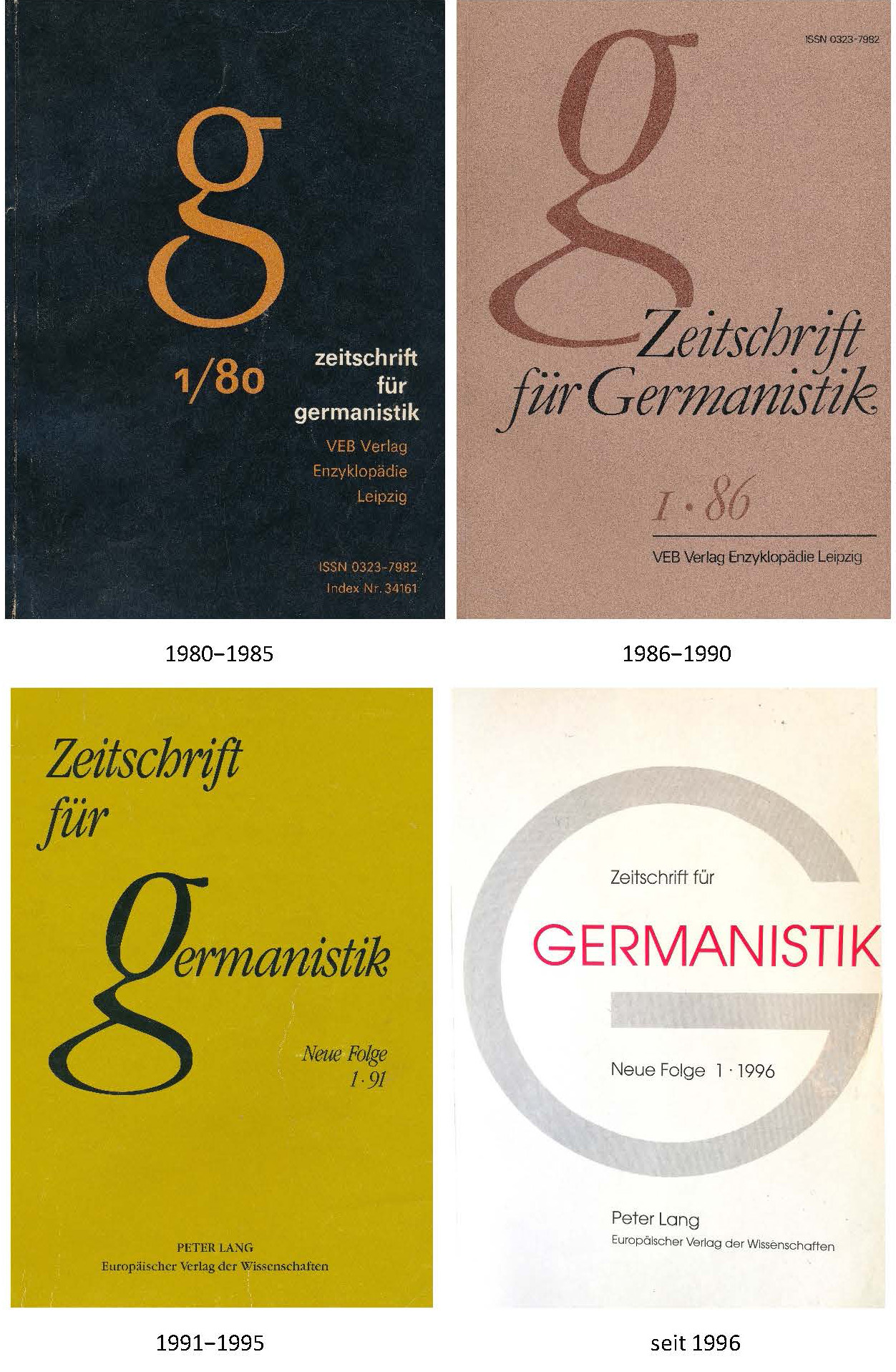 Cover